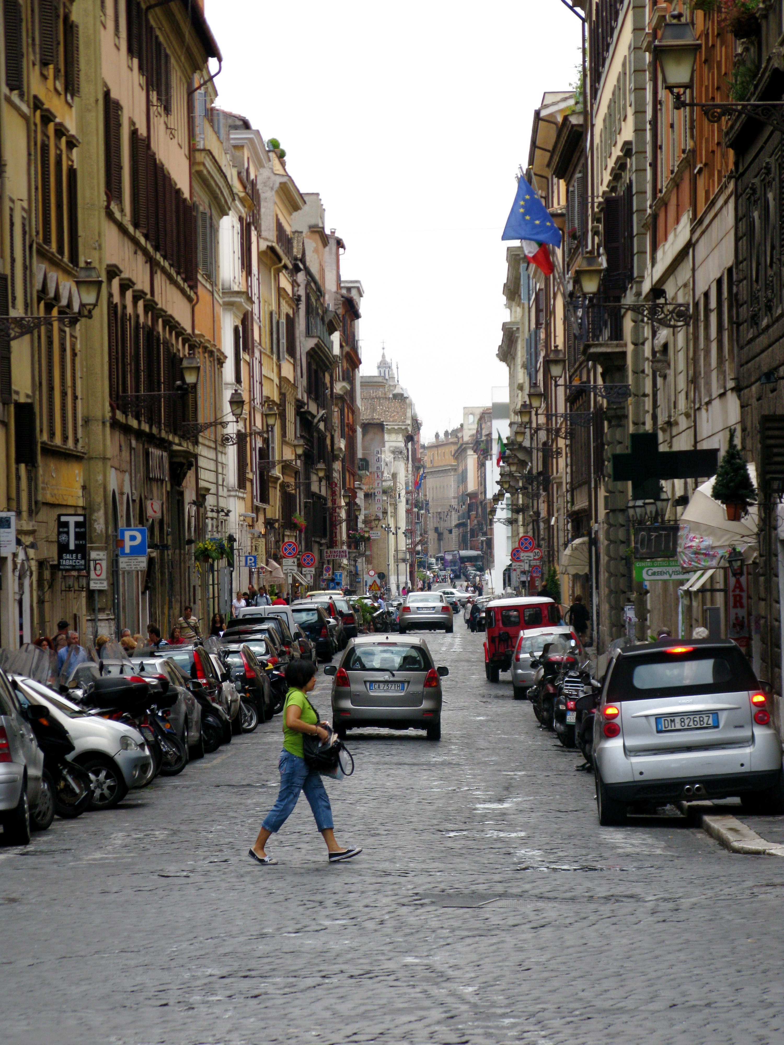 Via di Ripetta, a Roma, nel rione Campo Marzio. Visuale da piazza del Popolo.